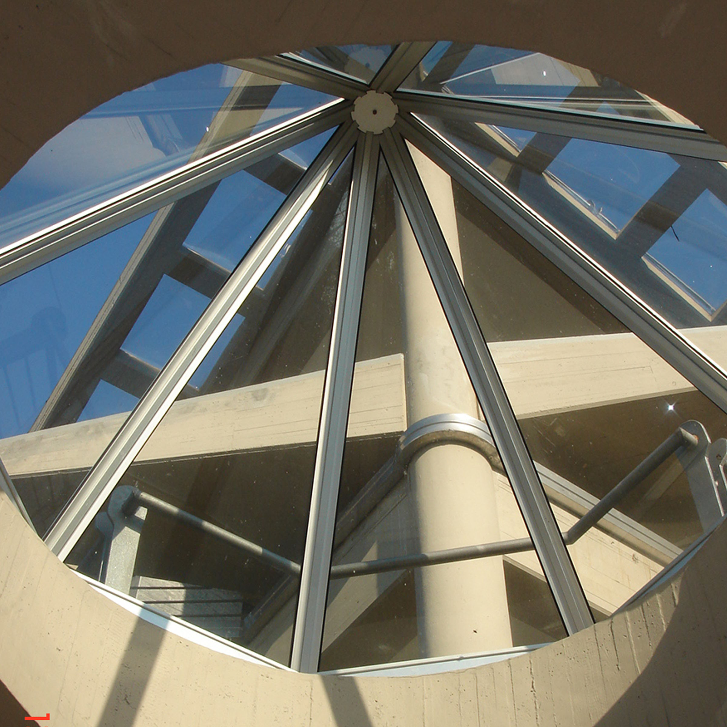 Particolare architettonico